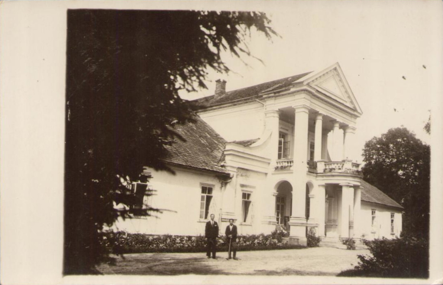 Беларуская (тарашкевіца): Падароск (Padarosk), сядзіба Чачотаў (Čačot)